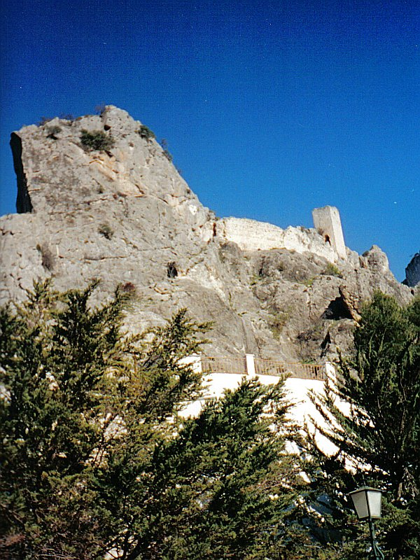 Vista parcial del Castillo de Tíscar.